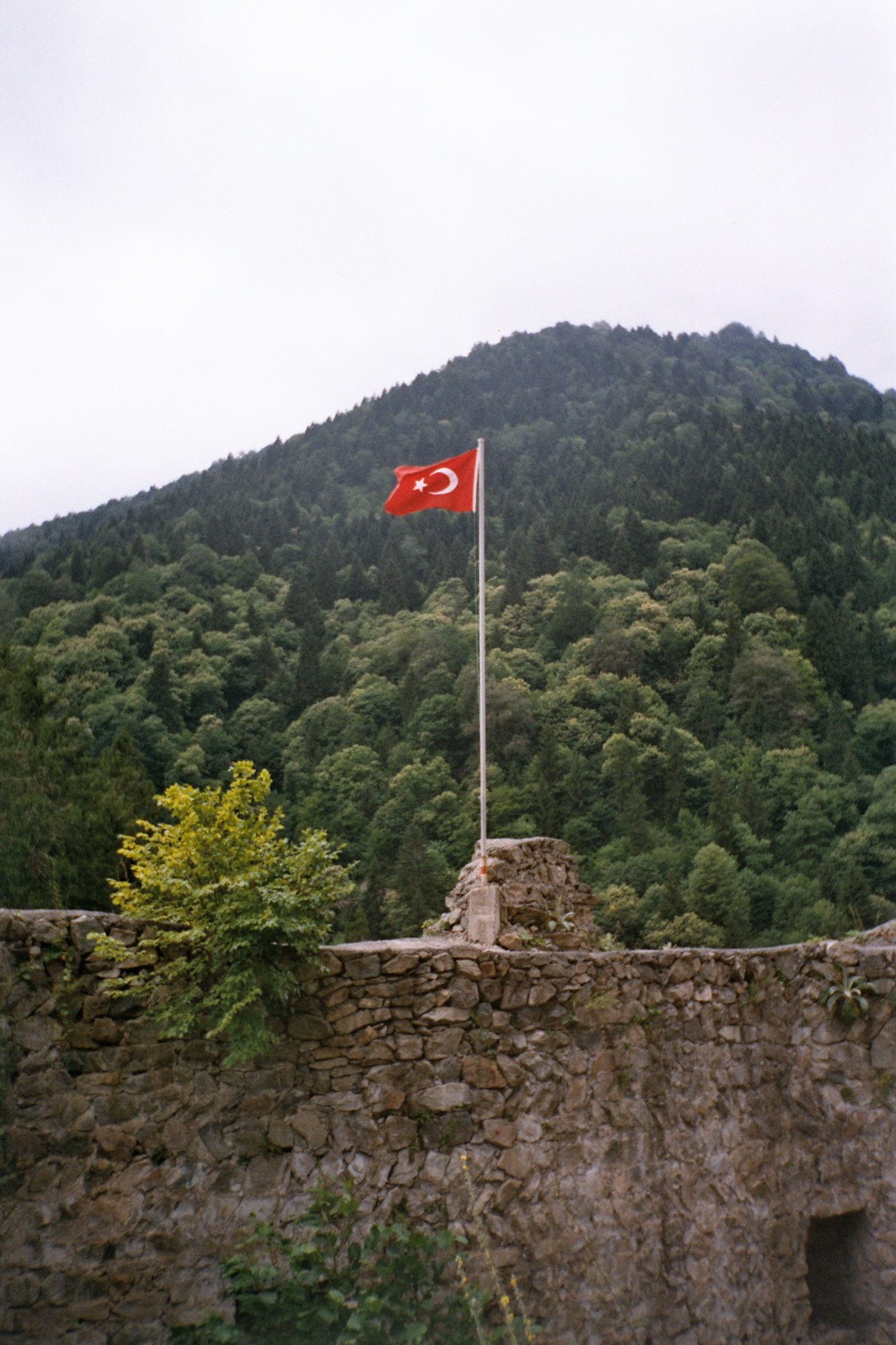 Zil Kale'nin Sancağı